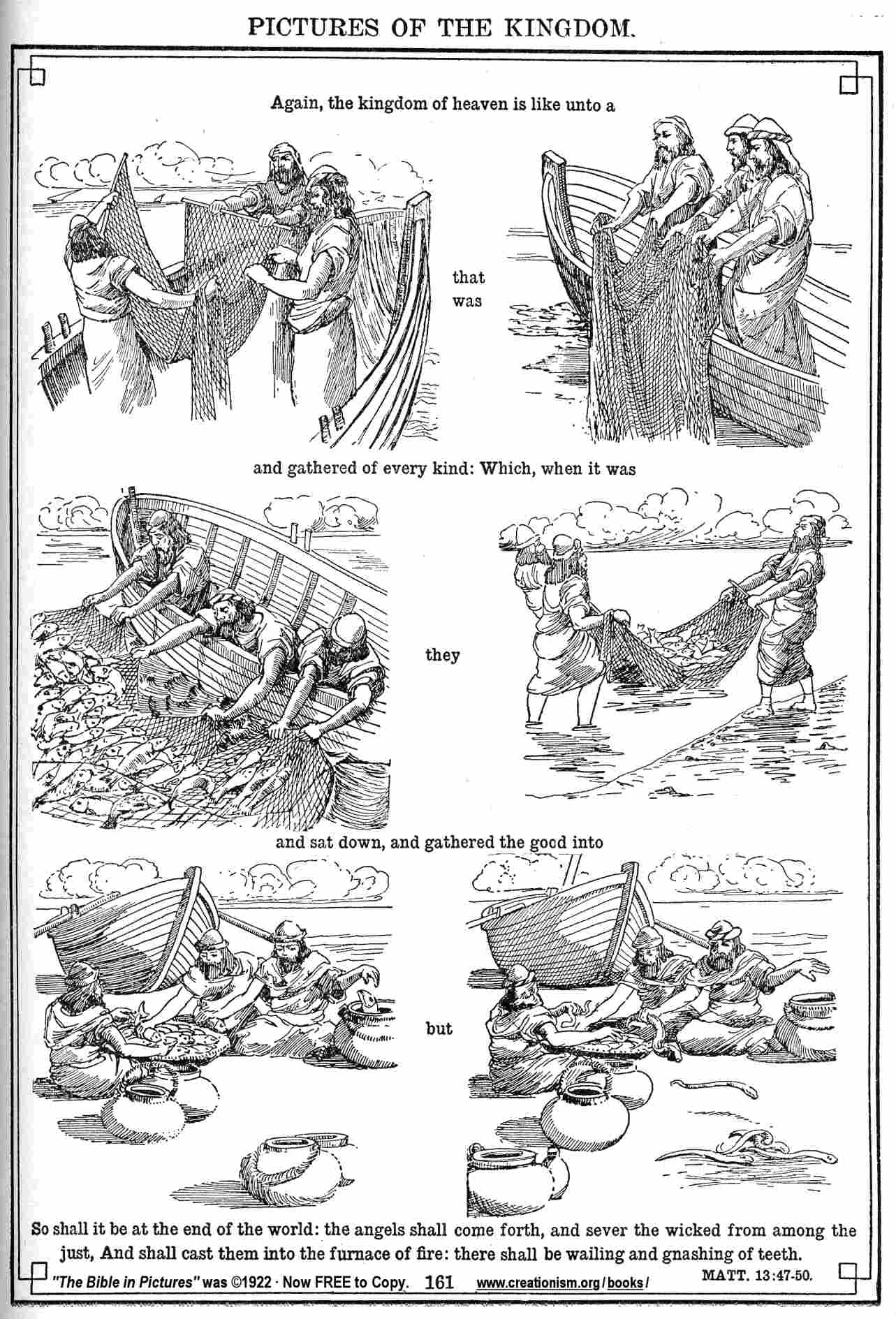 parable picture